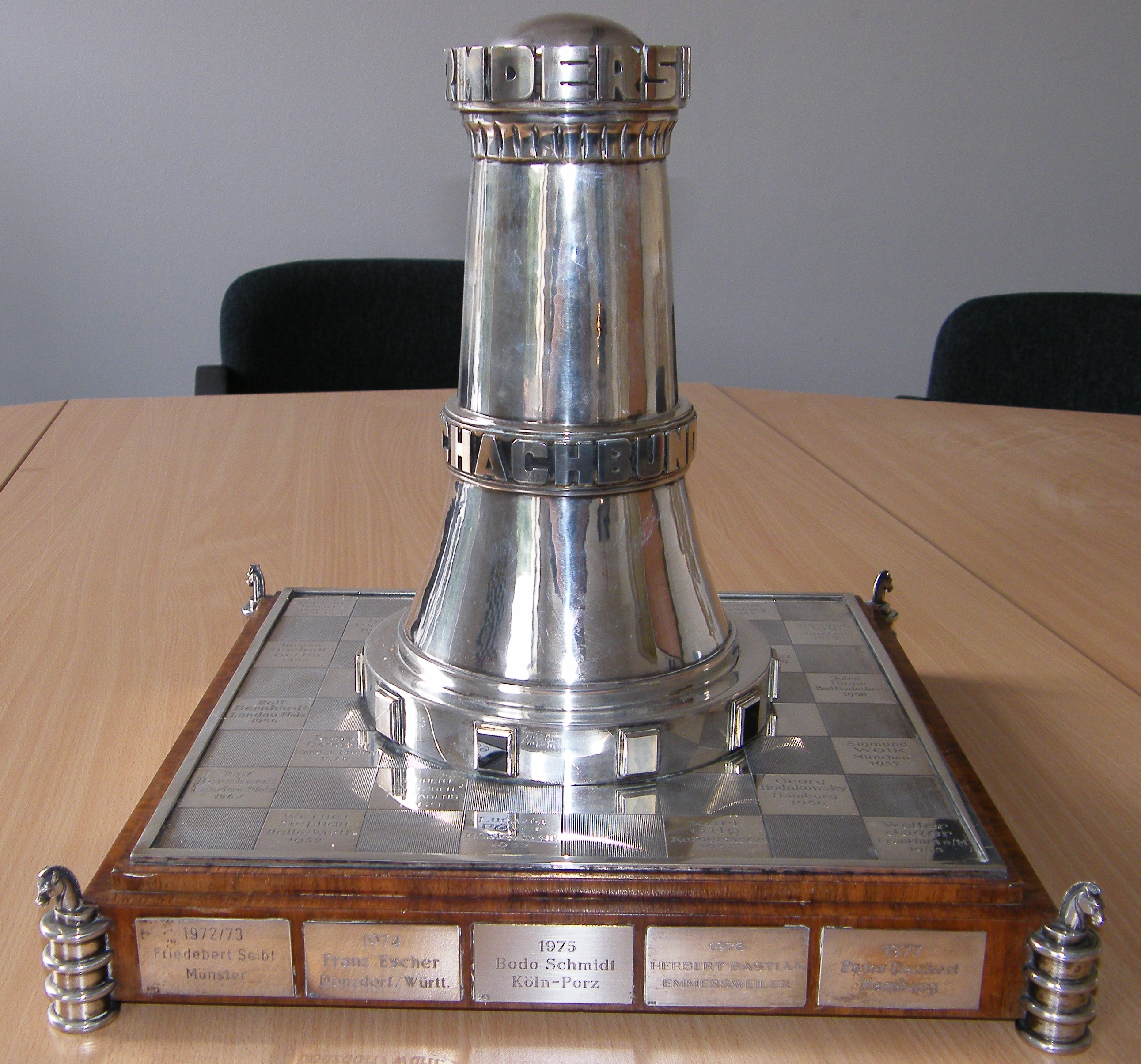 Pokal "Silberner Turm" bzw. Dähne-Pokal in der Geschäftsstelle des Deutschen Schachbundes